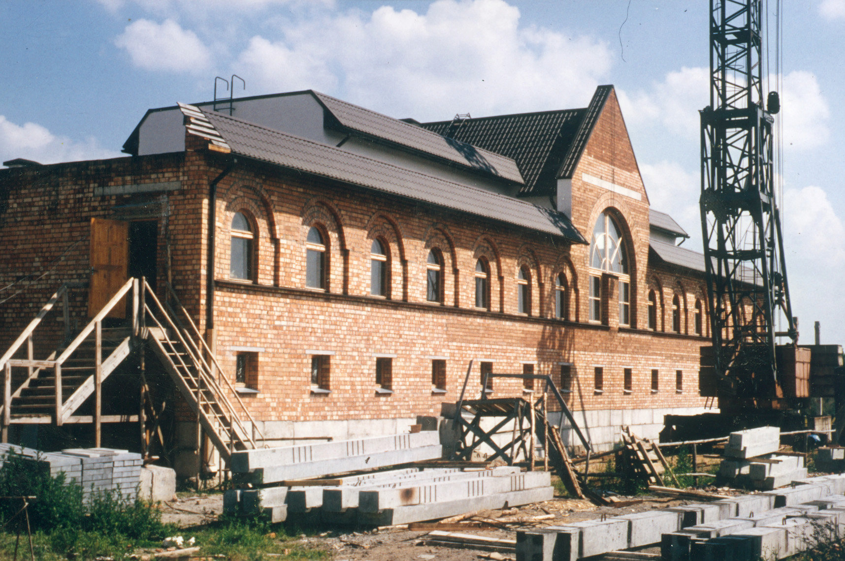 Строительство учебного корпуса храма иконы Божией Матери "Всех скорбящих Радость" в Минске.